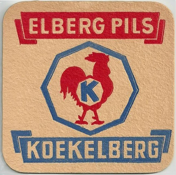 Sous-bock de la Grande Brasserie de Koekelberg - Ixelberg. 17 avenue de la Liberté. Koekelberg.